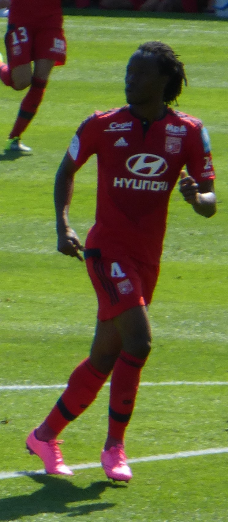 Bakary Koné au Trophée des champions 2015